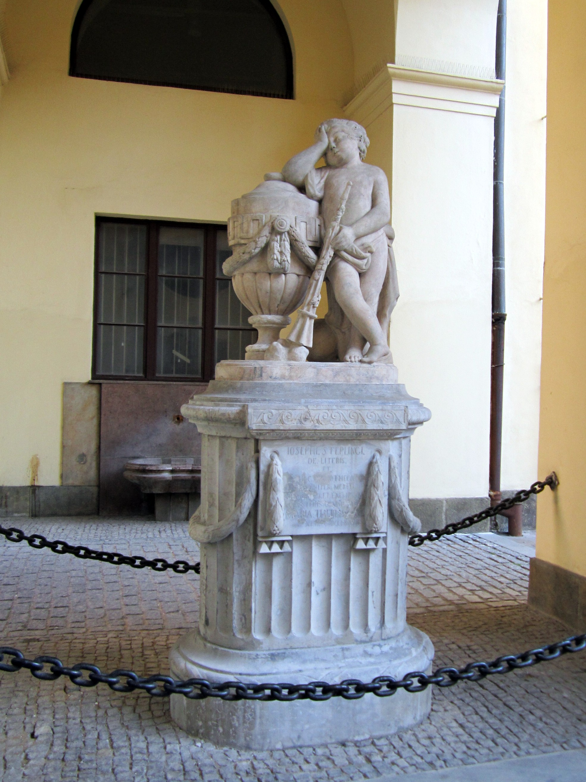 Pomník s Amorkem od Františka Platzera z roku 1780 nechala postavit Marie Terezie na památku matematika Josepha Steplinga